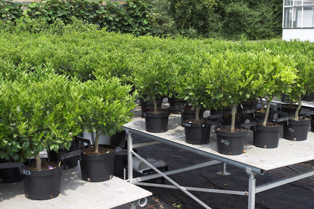 Düngunsgversuch bei Citruspflanzen im Fachgebiet Zierpflanzenbau